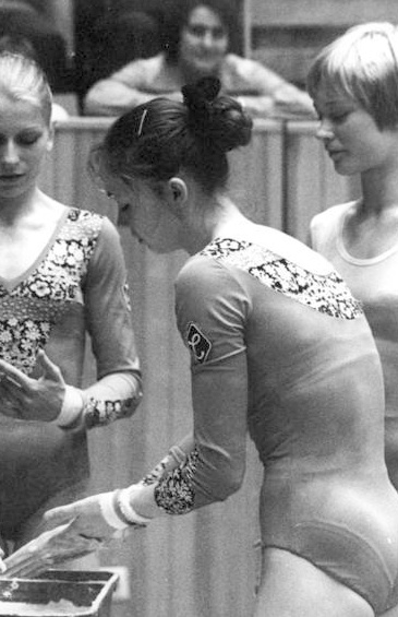 Ricarda Schmeißer